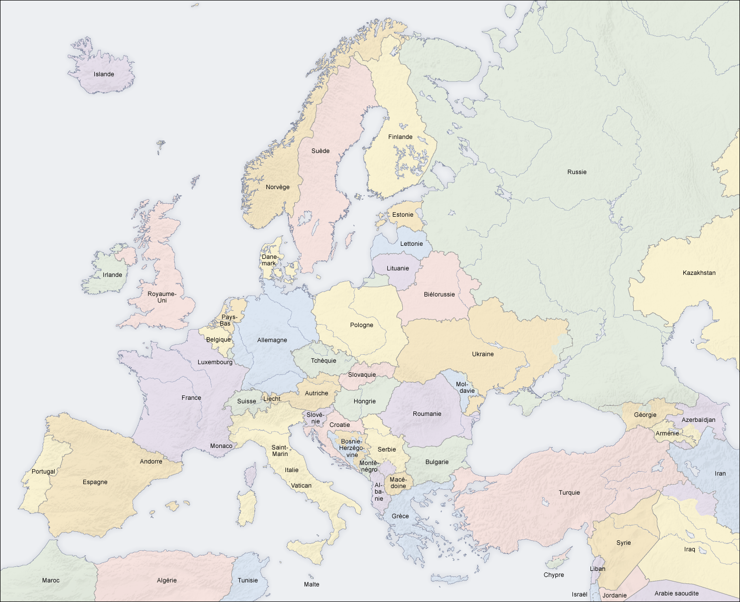 Carte de l'Europe - Souverainetés de facto